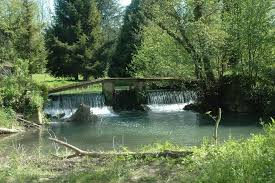 Photo de l'Aubetin à Mauperthuis